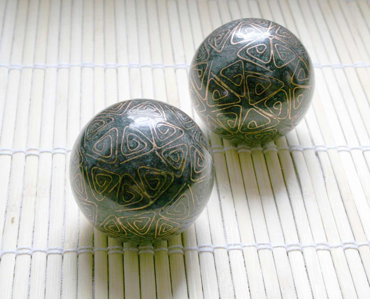 Baoding Balls / Qi Gong-Kugeln